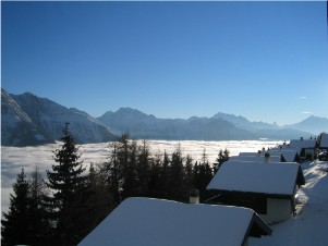 Bildbeschreibung: Hochnebel über dem Rhonetal Fotograf/Zeichner: Norbert Dierichsweiler, Bonn Datum: 26.Dezember 2005 Sonstiges: Hochnebel von 800 m bis 1.600 m Aufnahmestandort 1.850 m Richtung Süd/West